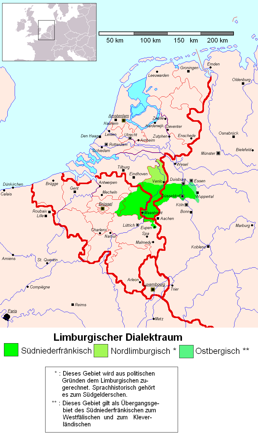 Darstellungskarte des Limburgischen einschließlich des Nordlimburgs (Südgeldersch) und Ostbergischen (Übergangsgebiet des Südniederfränkischen zum Kleverländischen und Westfälischen)